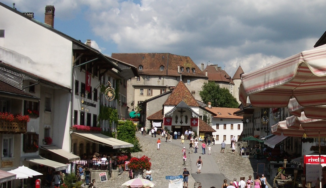 Gruyères, Switzerland self-made, August 2005